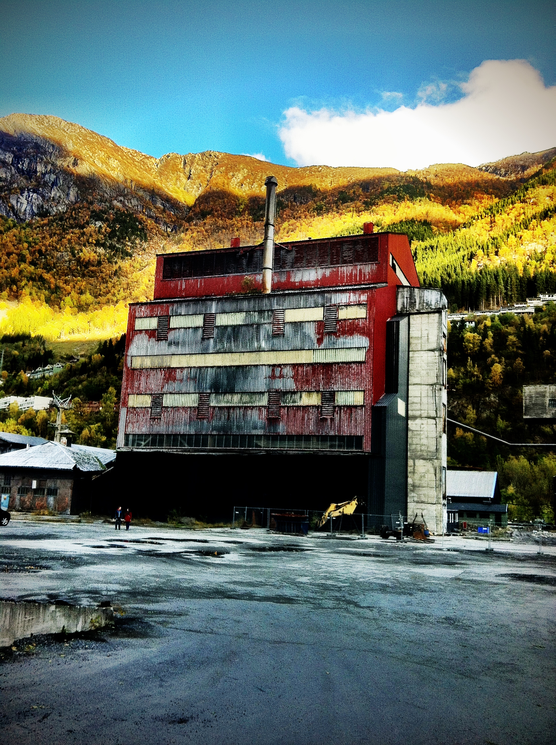 Elektrisk reduksjonsomn for danning av karbid ved ein reaksjon mellom koks og kalkstein. Omn 3 er sjølv i dag (2014) den største karbidsmelteomnen som er laga i verda.